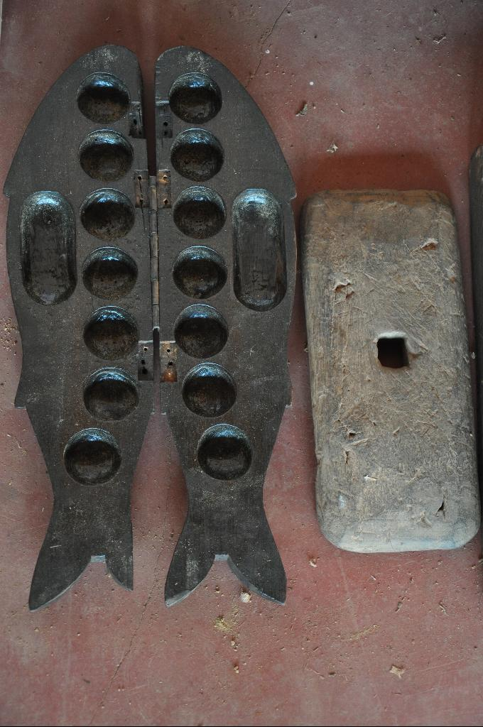 AttaguNi maNe